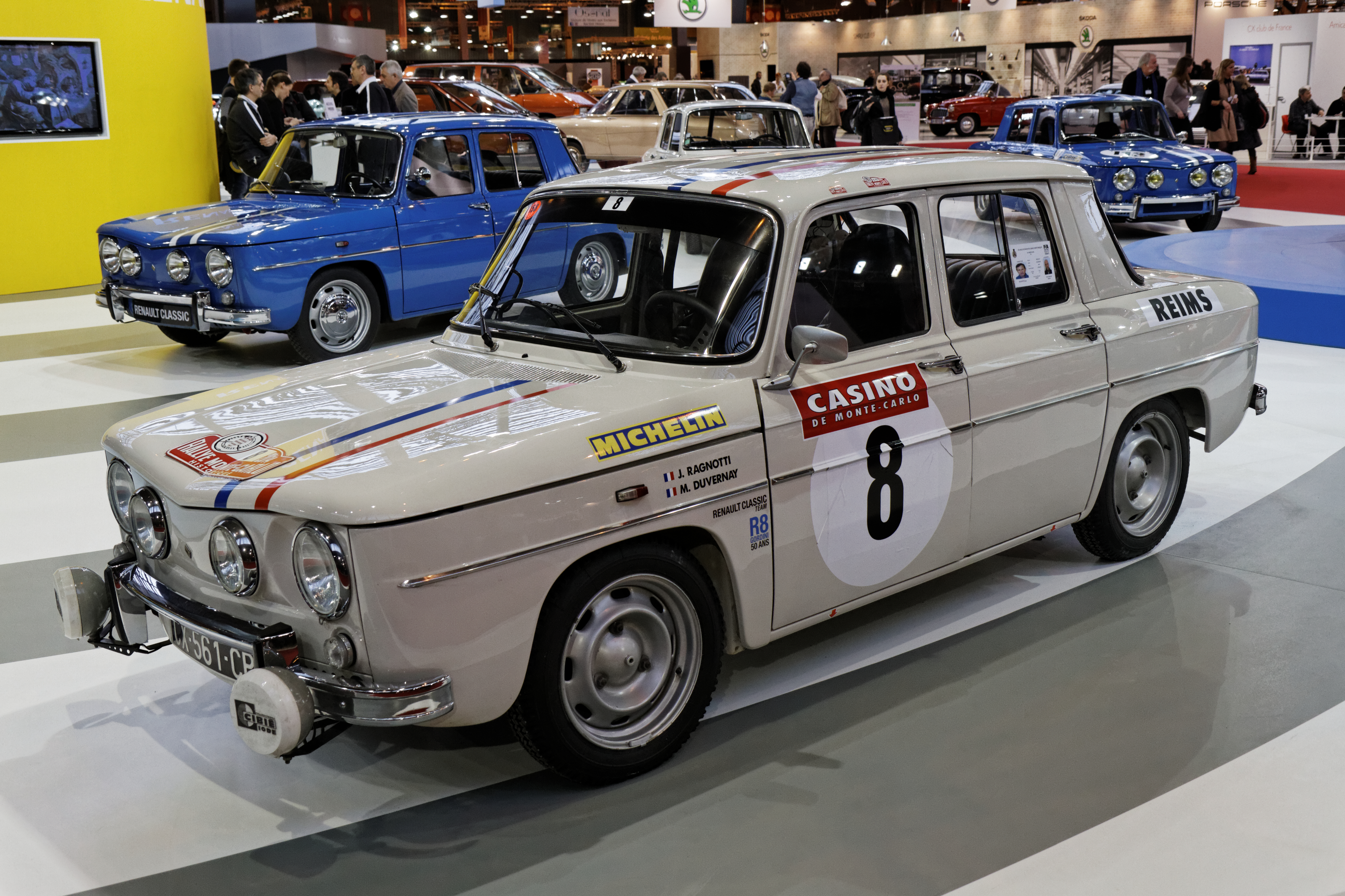 Une Renault 8 Gordini rallye présentée lors du salon Retromobile 2014.